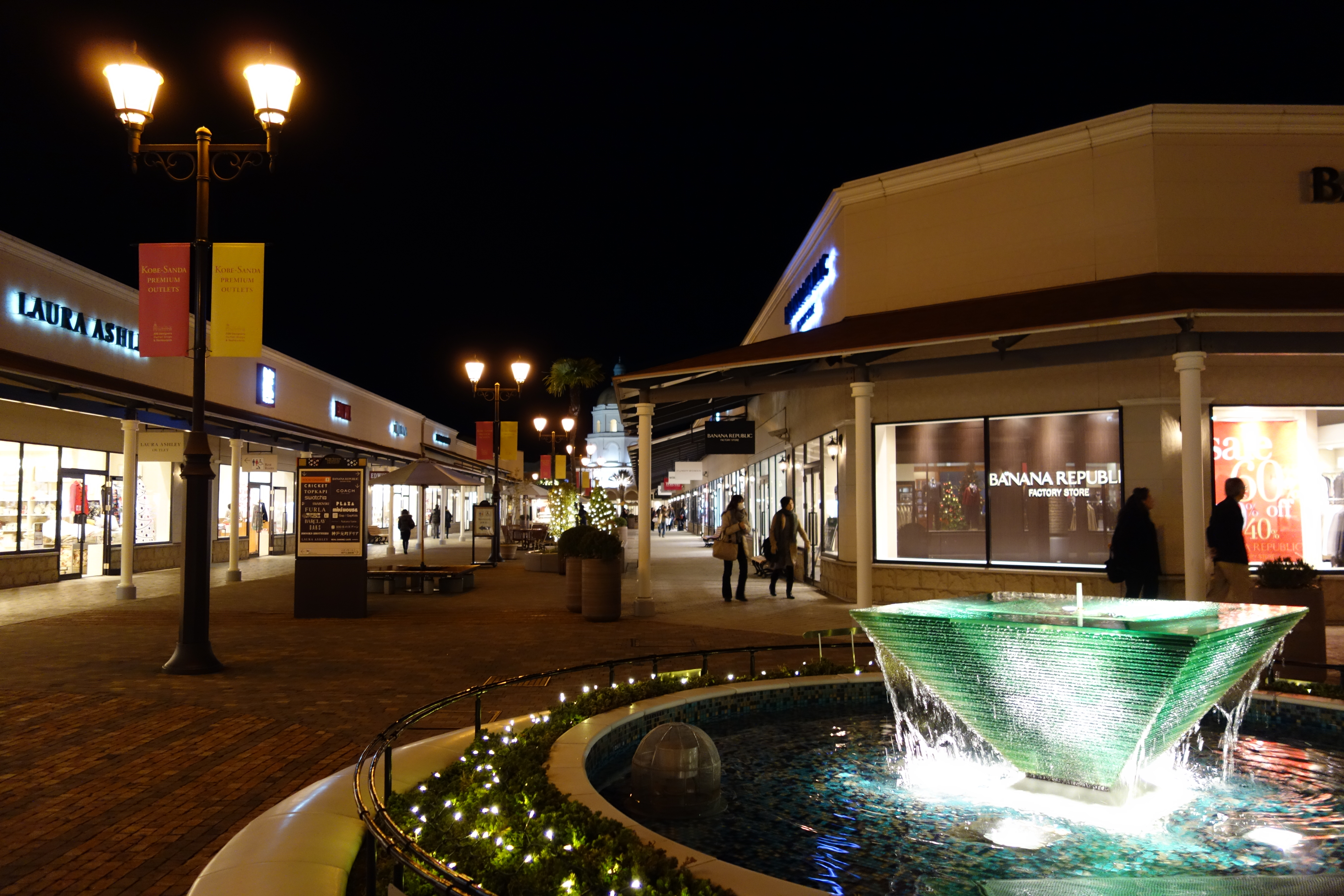 神戸三田プレミアム・アウトレット（夜景） 2012年12月撮影